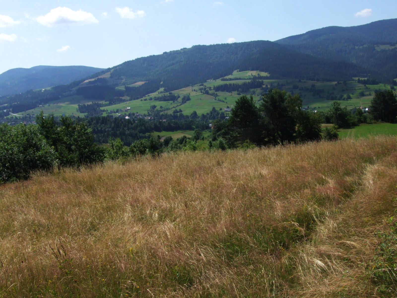 Jaworzynka, widok z Cyrkowej Góry. Po jej lewej stronie Gorc, po prawej Kudłoń